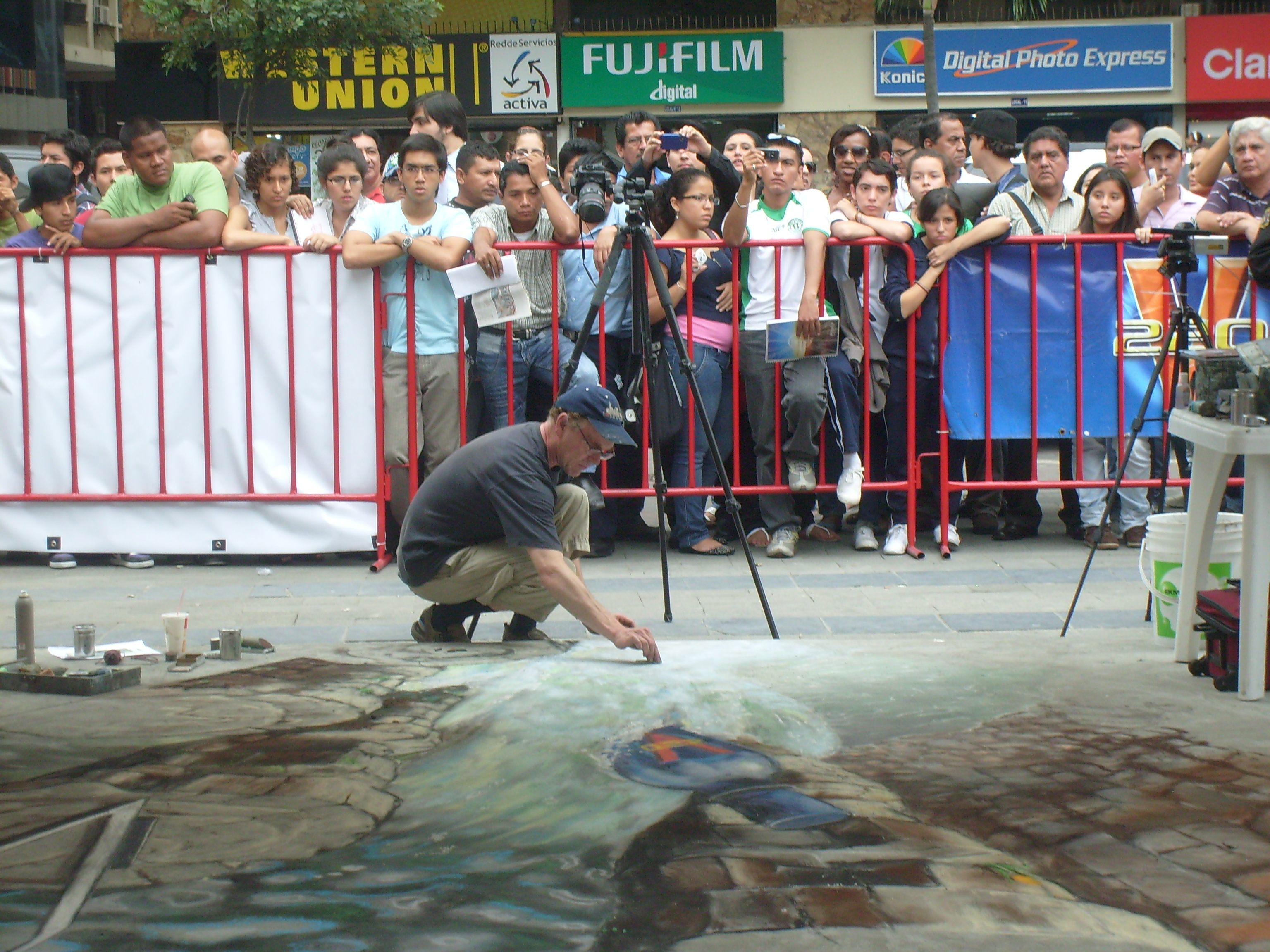 El artista británico Julian Beever pintando en la Plaza San Franscisco de la ciudad de Guayaquil Ecuador